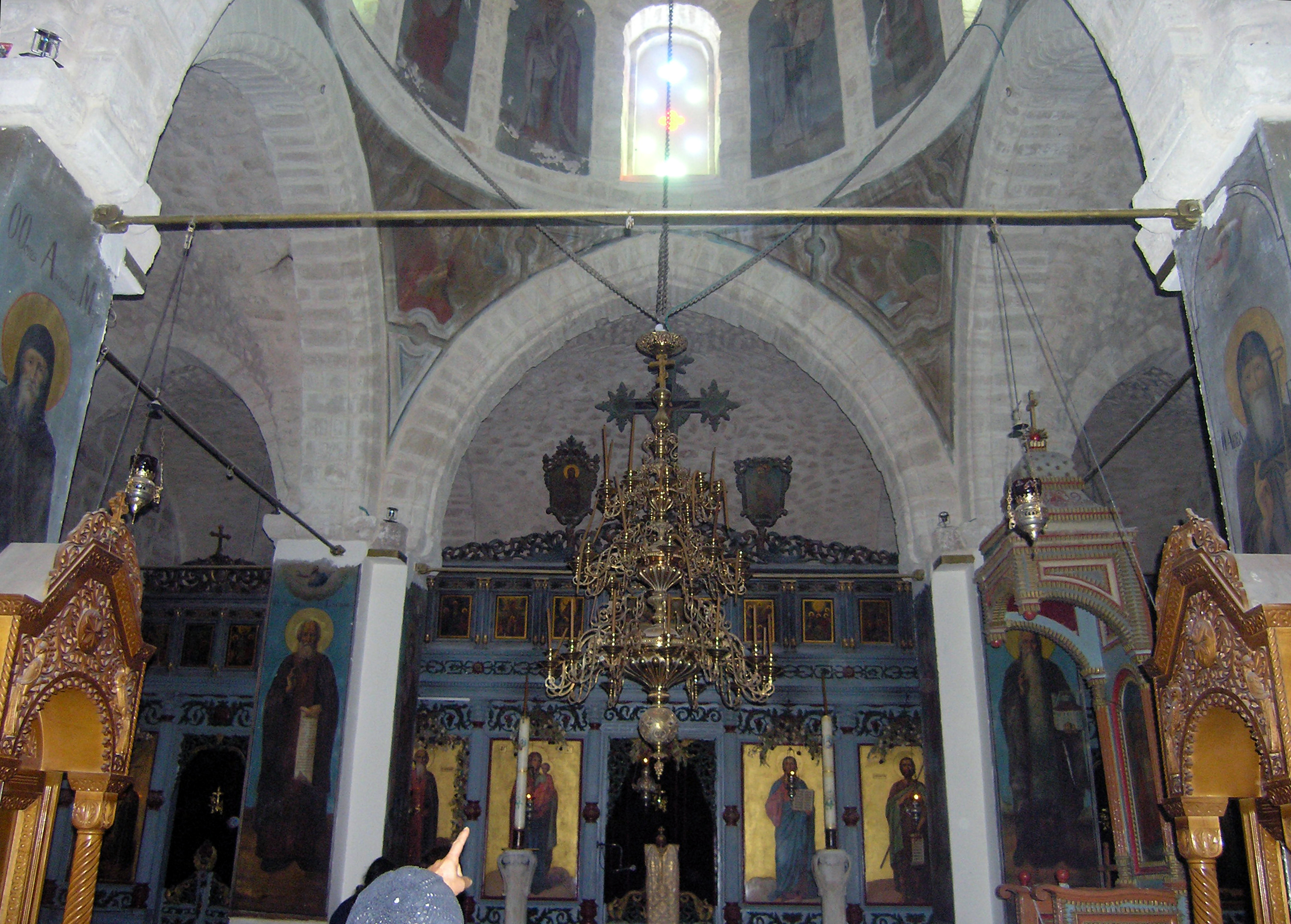 Интерьер главного храма монастыря Святого Герасима